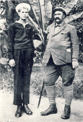 Yonko and Nikola Vapcarovi